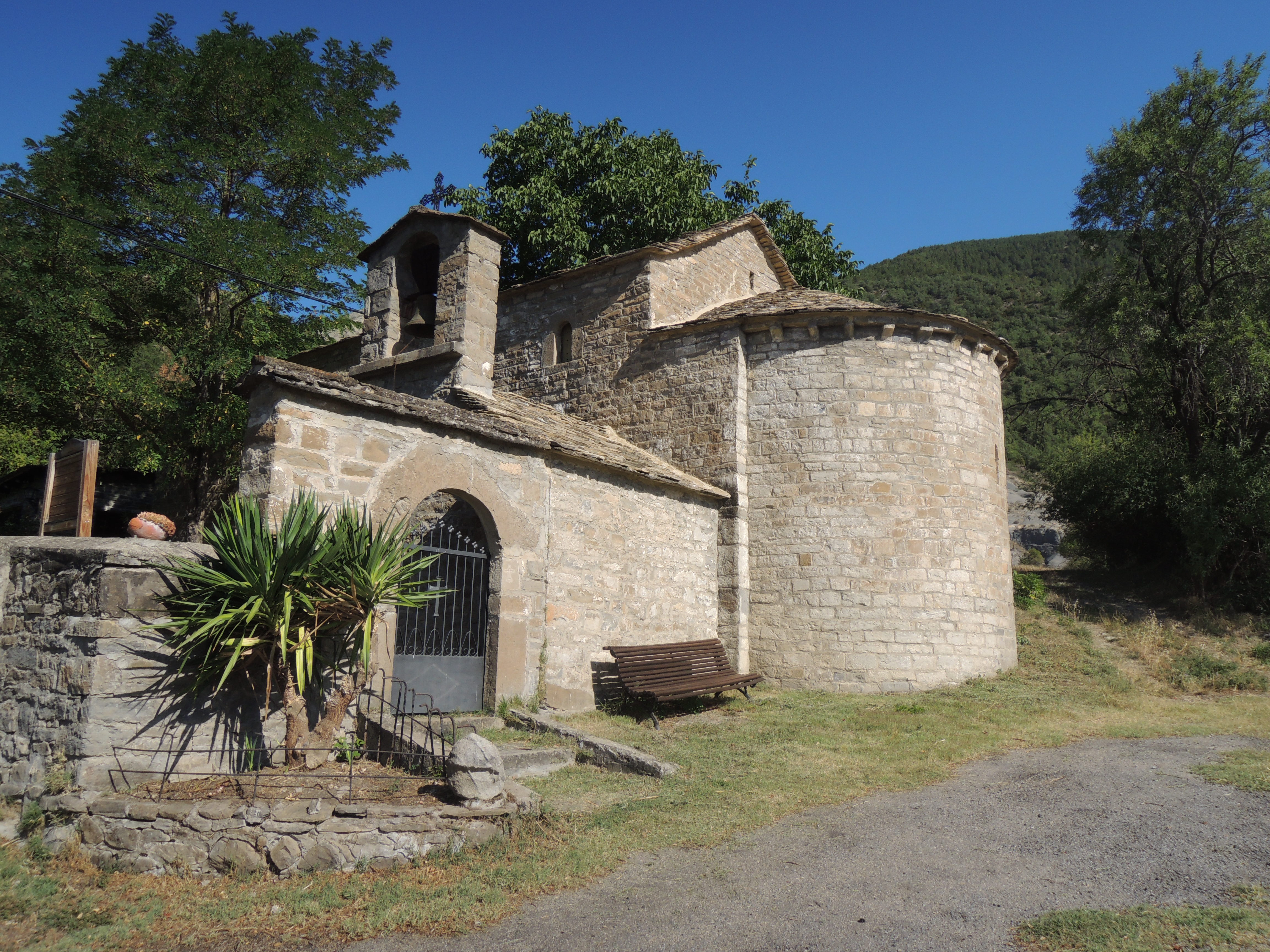 Esta foto participó en el juego En otro lugar de Flickr.